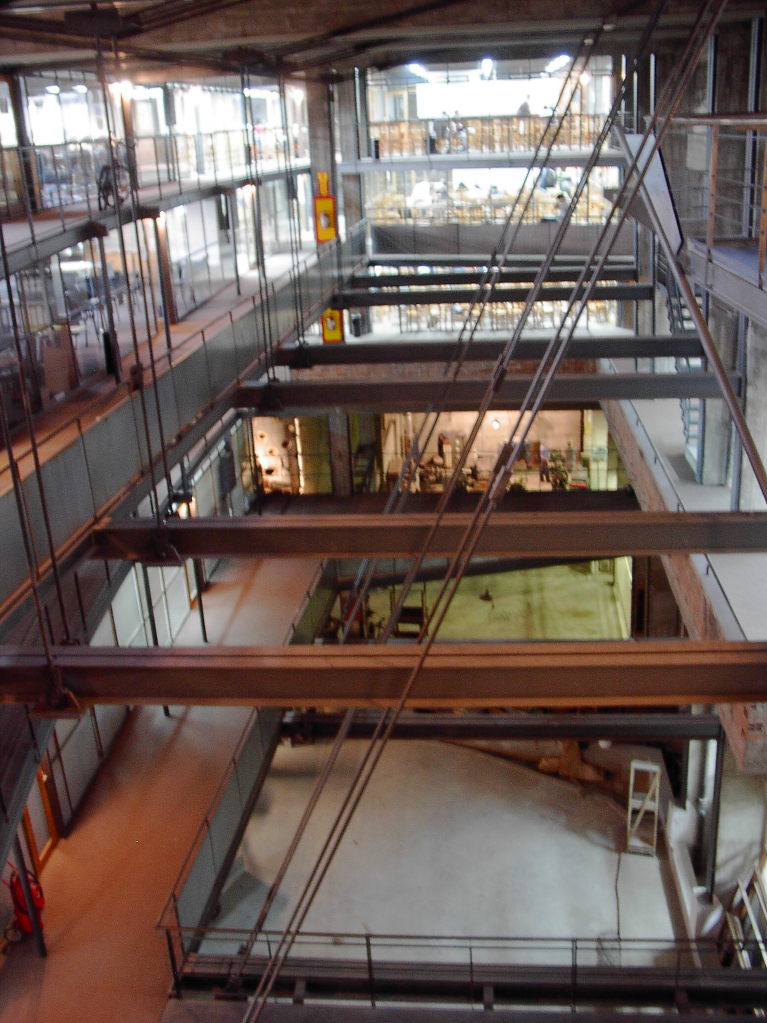 Foto del interior de la Facultad, instituto del IMFIA + salones de clase.